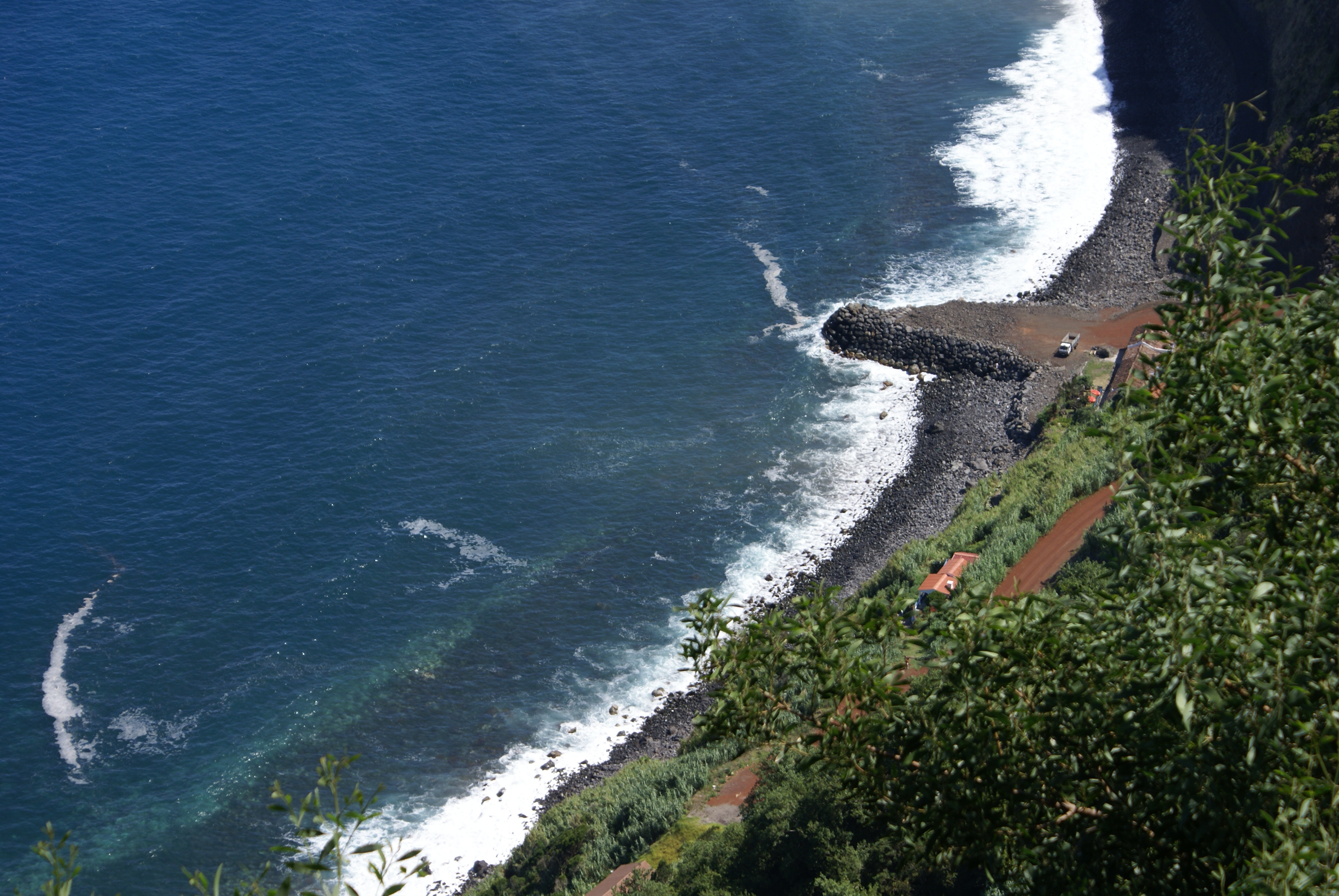 Vista parcial da Fajã do Lombo Gordo, foto feita do Miradouro da Ponta da Madrugada, Nordeste, ilha de São Miguel, Açores